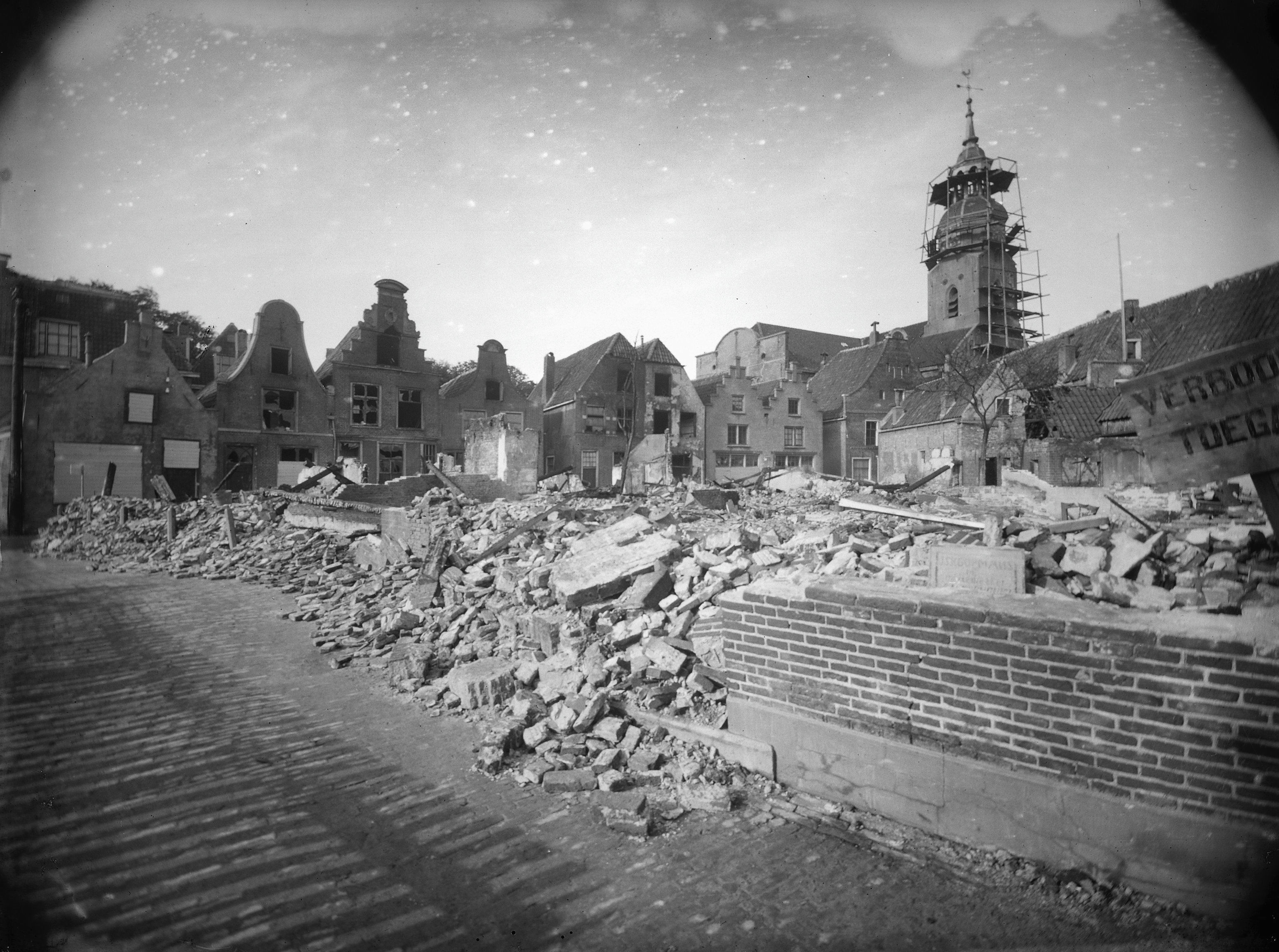 Wijk III, verbrande huizen - In 1926 woedde er een grote brand in Blokzijl, waarbij veel schade werd aangericht in de Kerkstraat